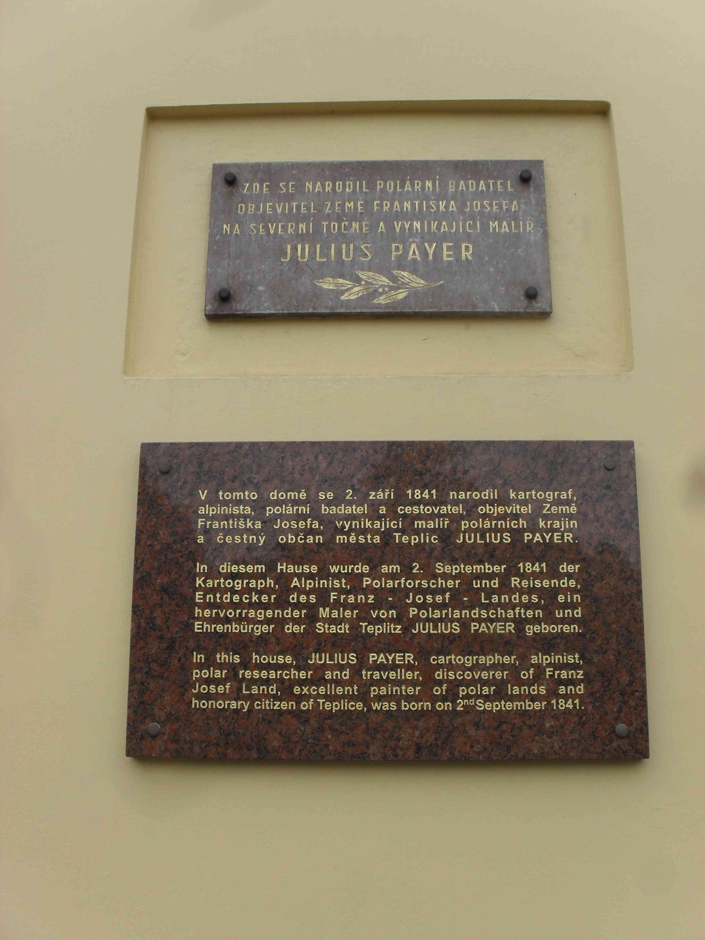 Fotografie Teplické hospody U Černé kočky, poblíž hotelu Giovanni.